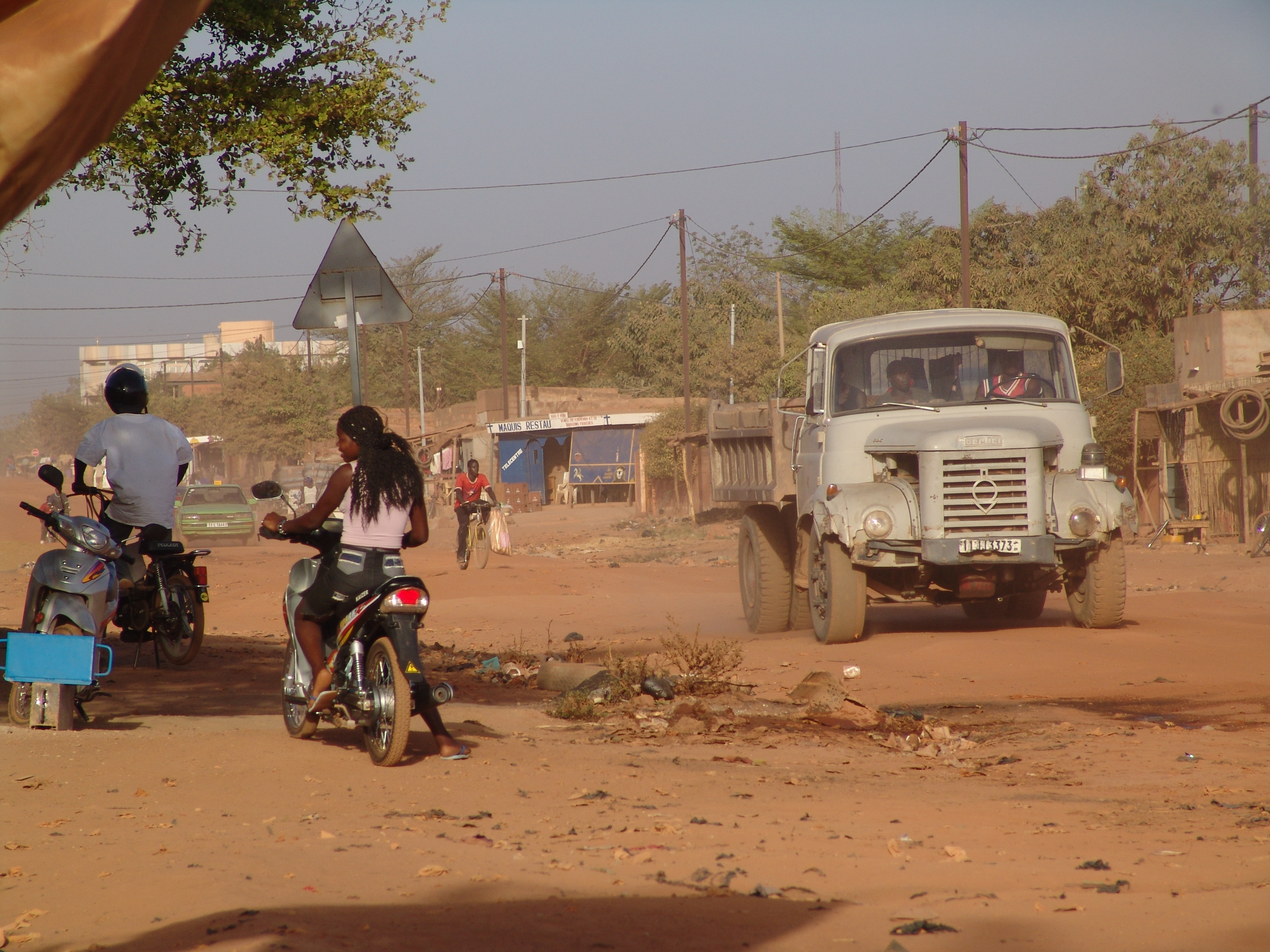 Rue Ouagadougou, Burkina Faso